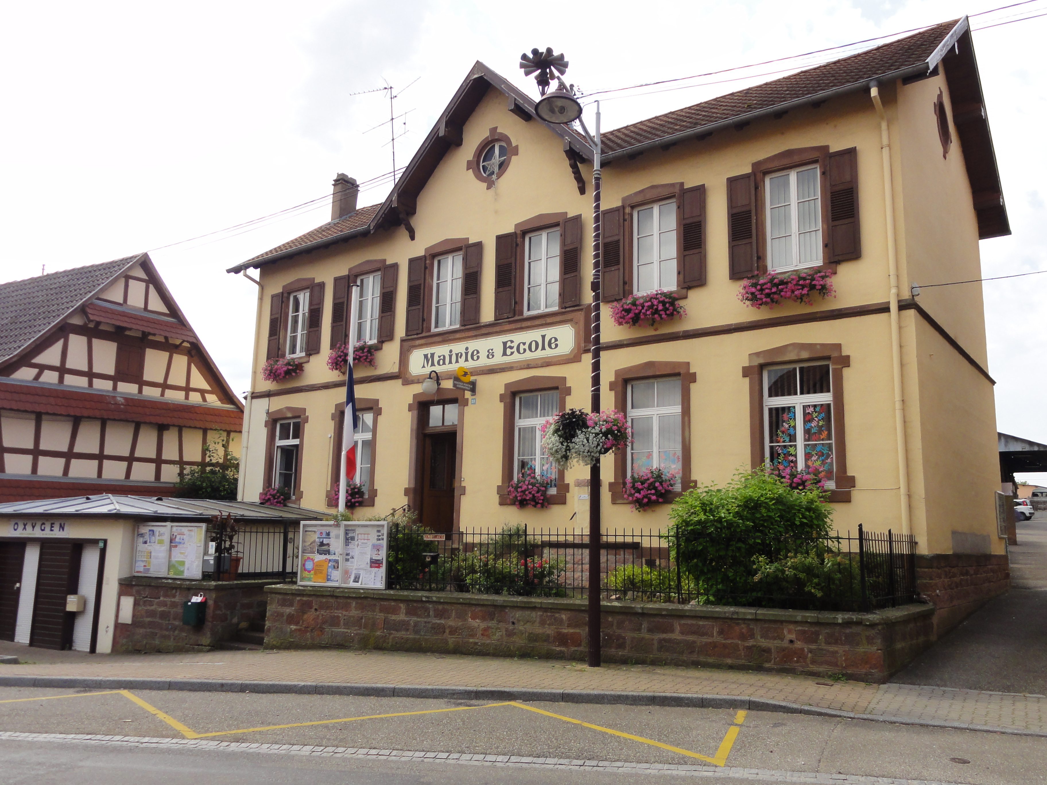 Alsace, Bas-Rhin, Quatzenheim, Mairie-école, rue Principale.